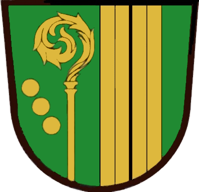 Das Wappen nimmt Bezug auf die Geschichte und Eigenart der Gemeinde Preitenegg. Der Bischofsstab und die drei goldenen Kugeln symbolisieren den Heiligen Nikolaus, den Kirchenpatron des Ortes Preitenegg. Der goldene Längsstreifen mit den schwarzen Fäden steht für den alten Verkehrsweg über die Pack, der durch die Jahrhunderte als Landschafts- wie auch Wirtschaftsfaktor für die Gemeinde von Bedeutung war, ob einst als Saumpfad, Fahrweg, Packer Bundesstraße oder heute als moderne Südautobahn A 2. Das Grün steht als Symbol für die Natur, den Wald bzw. die Forst- und die Landwirtschaft, welche die Gemeinde Preitenegg stark prägen. Das Gold soll auf den Sonnenreichtum des Luftkurortes Preitenegg hinweisen.